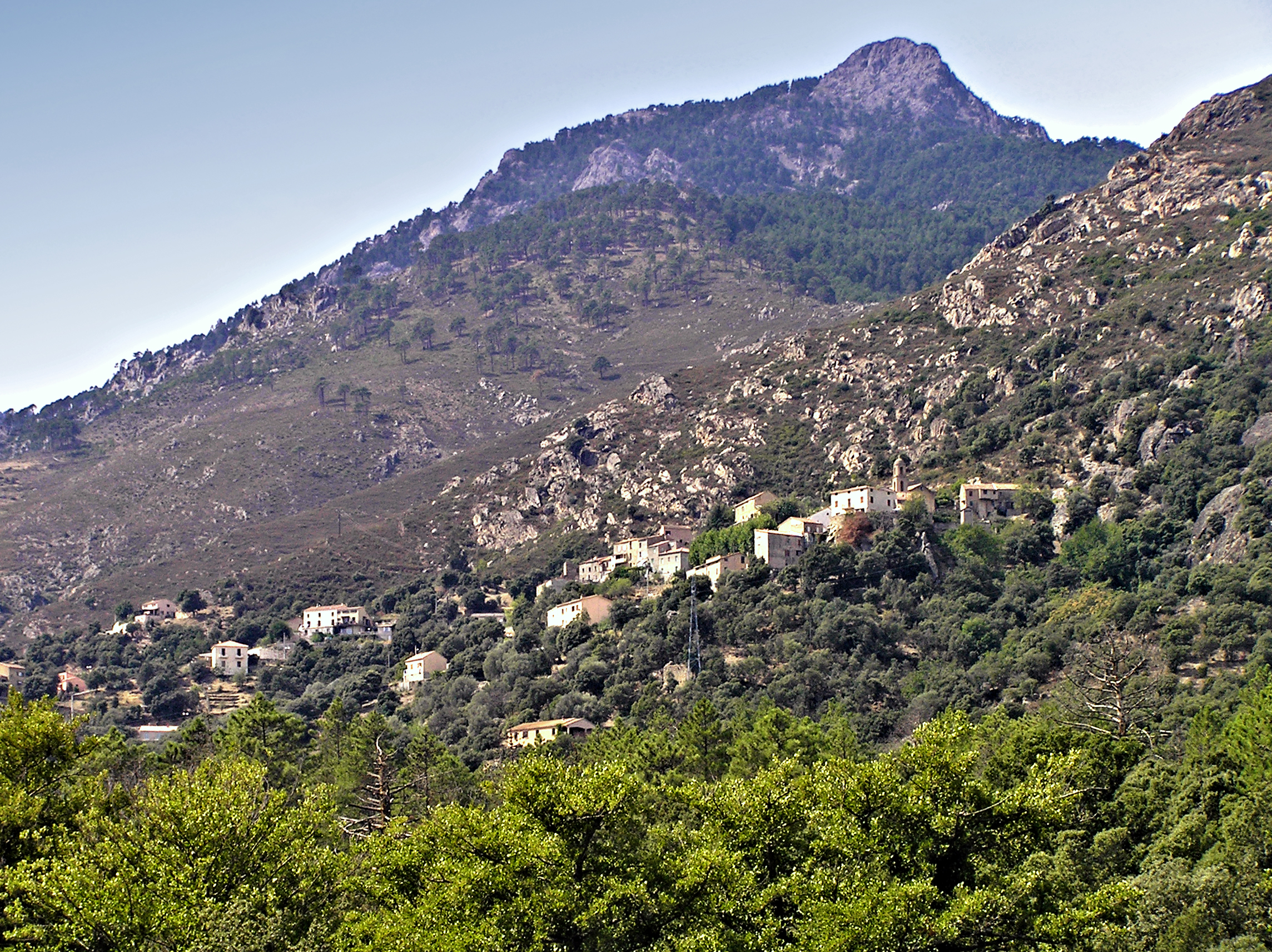 Castirla (Corsica) - Village